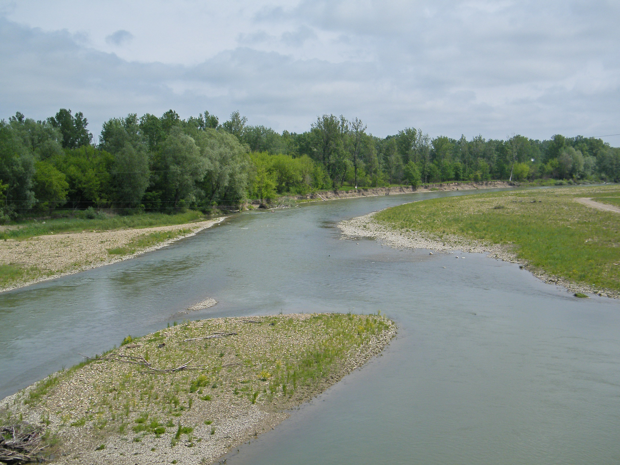 Река Прут